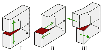 Spannungsintensitätsfaktor